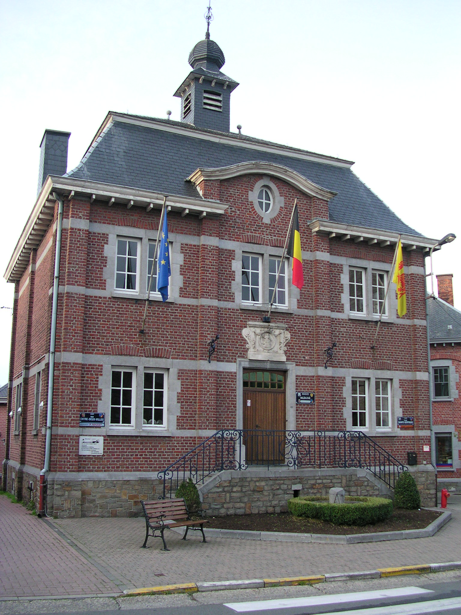 Blegny bei Lüttich